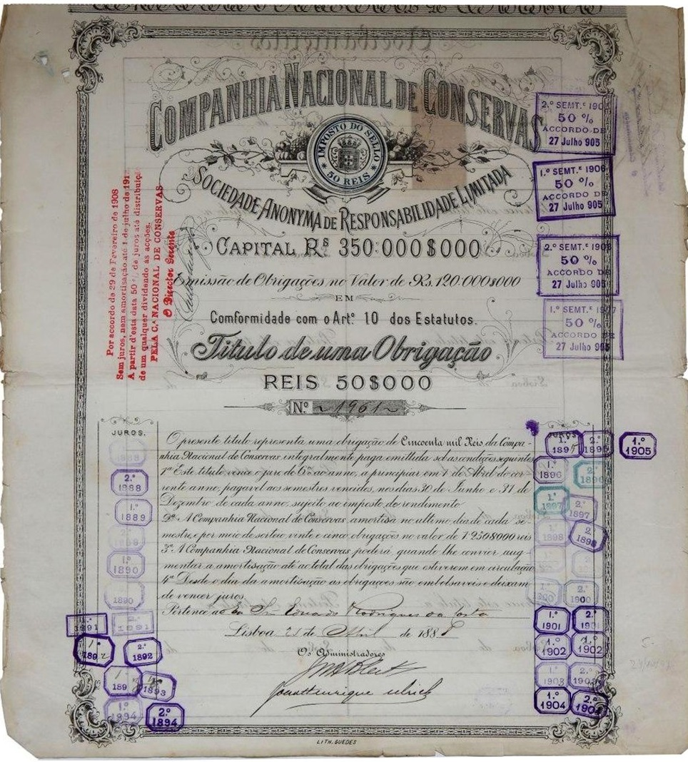 CNC (1888)